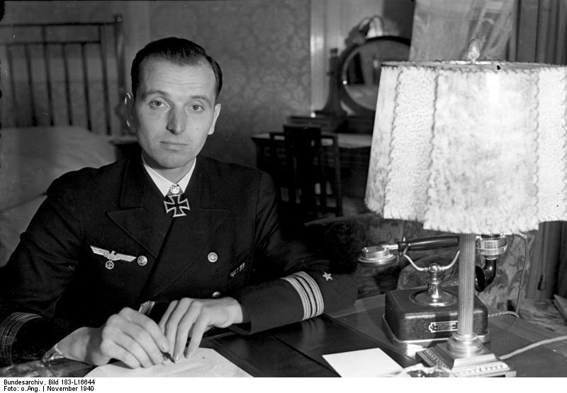 Kapitänleutnant Otto Kretschmer Kapitänleutnant Kretschmer wurde als sechster Offizier der deutschen Wehrmacht mit dem Eichenlaub zum Ritterkreuz des Eisernen Kreuzes ausgezeichnet. 14.11.1940 [Herausgabedatum] Abgebildete Personen: Kretschmer, Otto: Kapitänleutnant, Ritterkreuz (RK), Marine, Admiral, Bundesrepublik Deutschland (PND 11937806X)